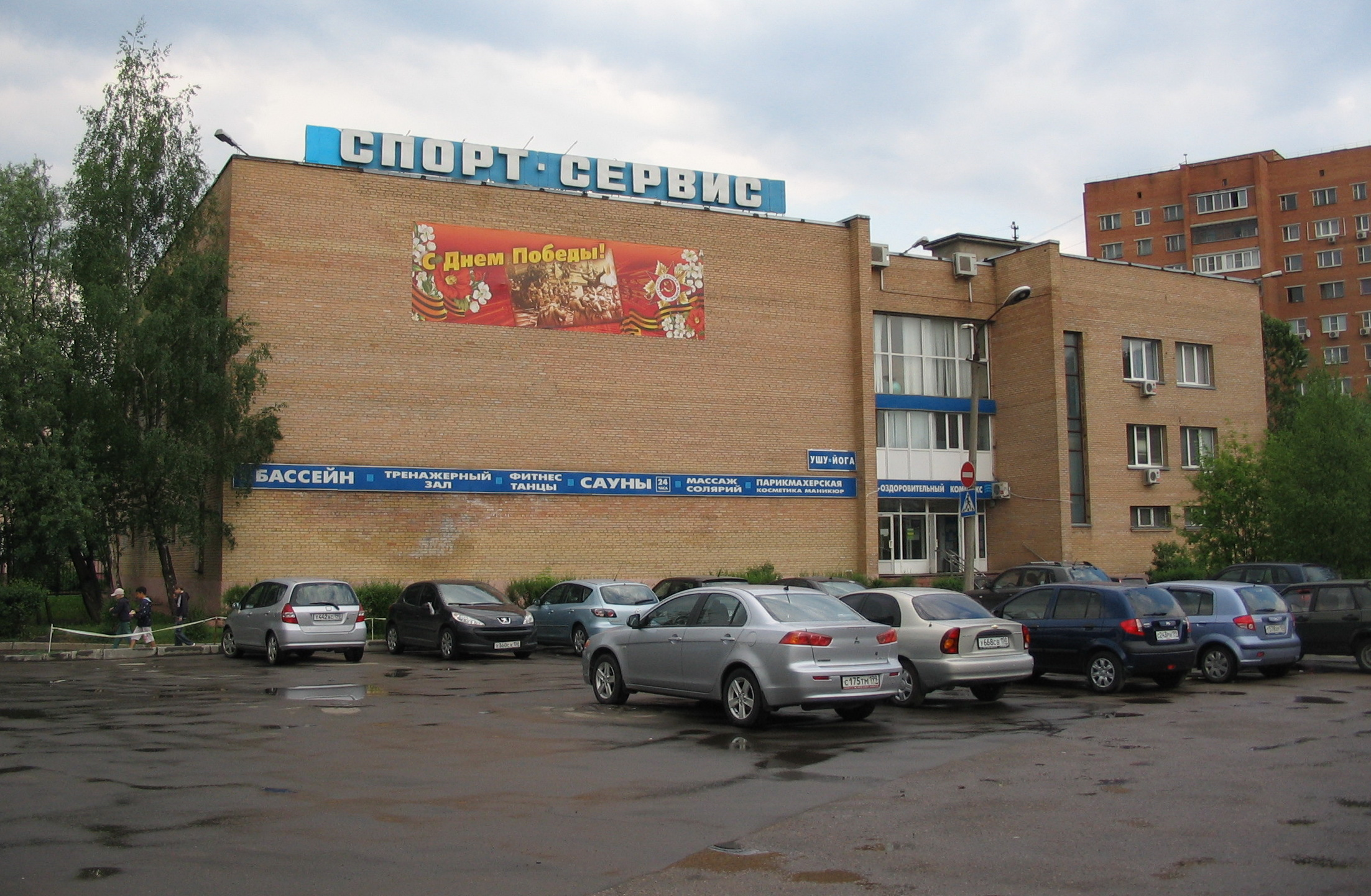 Здание реутовского бассейна.